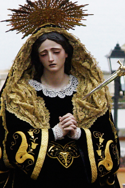 Nuestra Señora de los Dolores, 1816. Fernando Estévez de Salas Parroquia de San Juan Bautista, Villa de La Orotava.